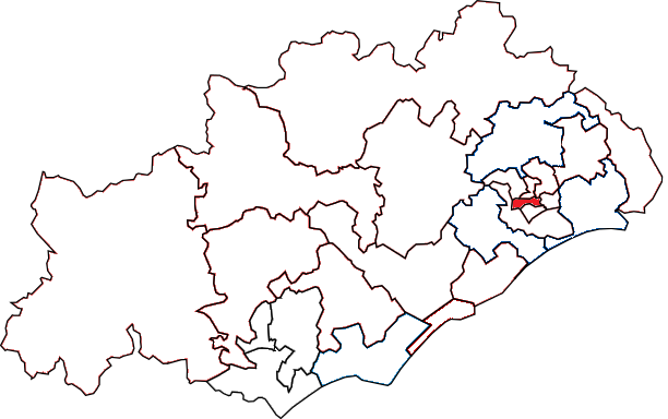 Situation du canton dans le département de l'Hérault